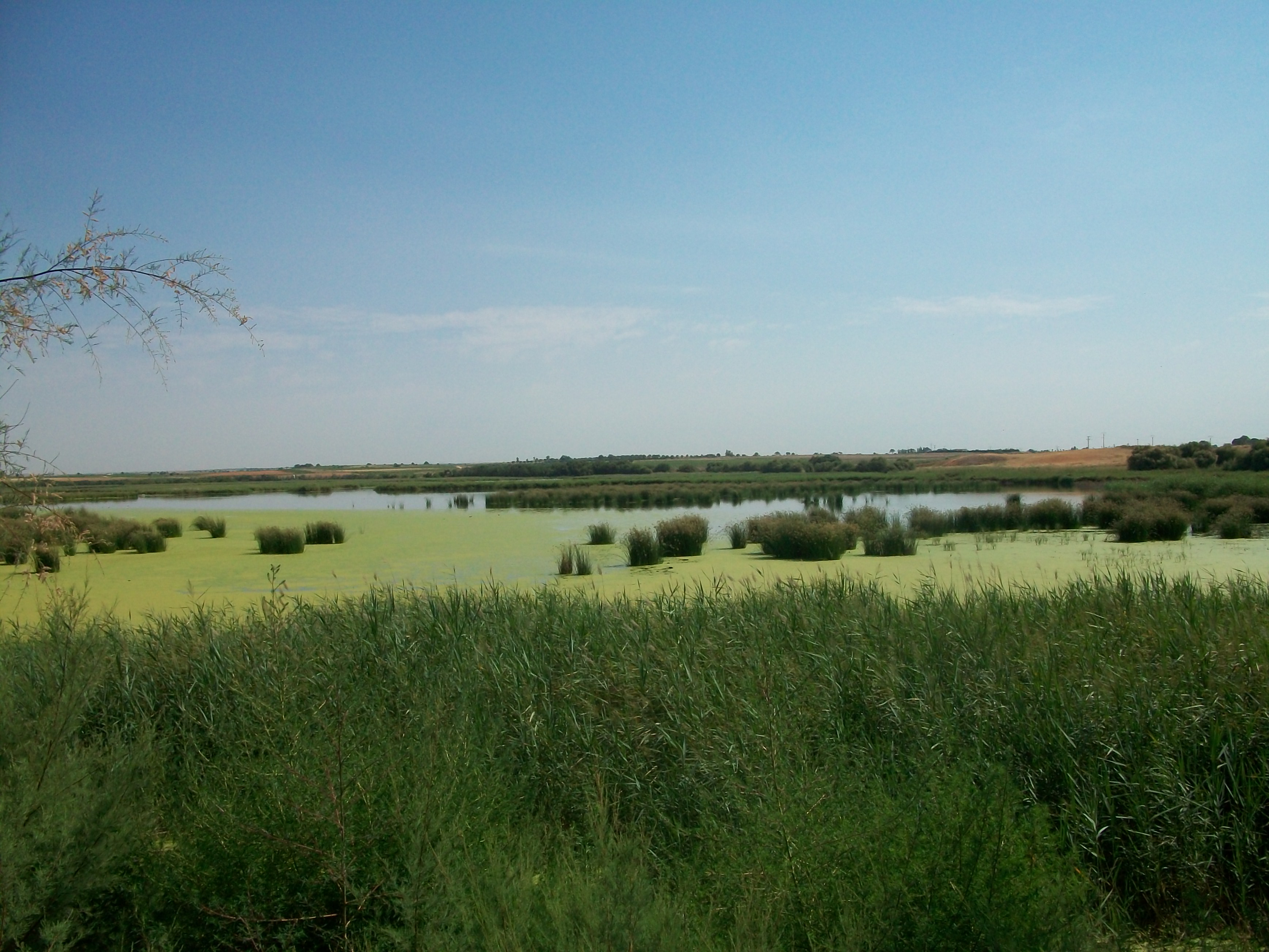 Laguna de la Vega desde un mirador en Pedro Muñoz.